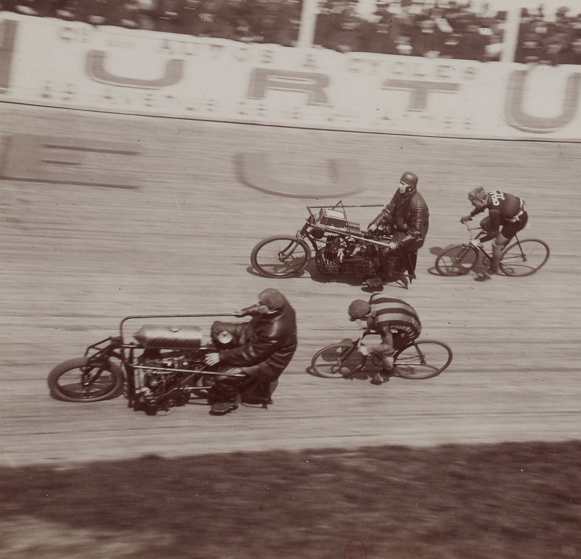 [Collection Jules Beau. Photographie sportive] : T. 25. AnnÃ©e 1904 / Jules Beau : F. 45v. [Course Scratch, vÃ©lodrome Buffalo, 10 avril 1904]